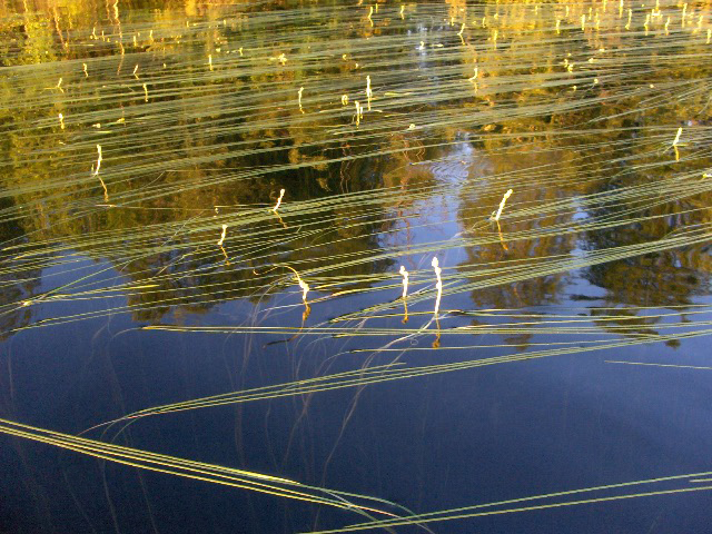 Sparganium gramineum in blossom Finland